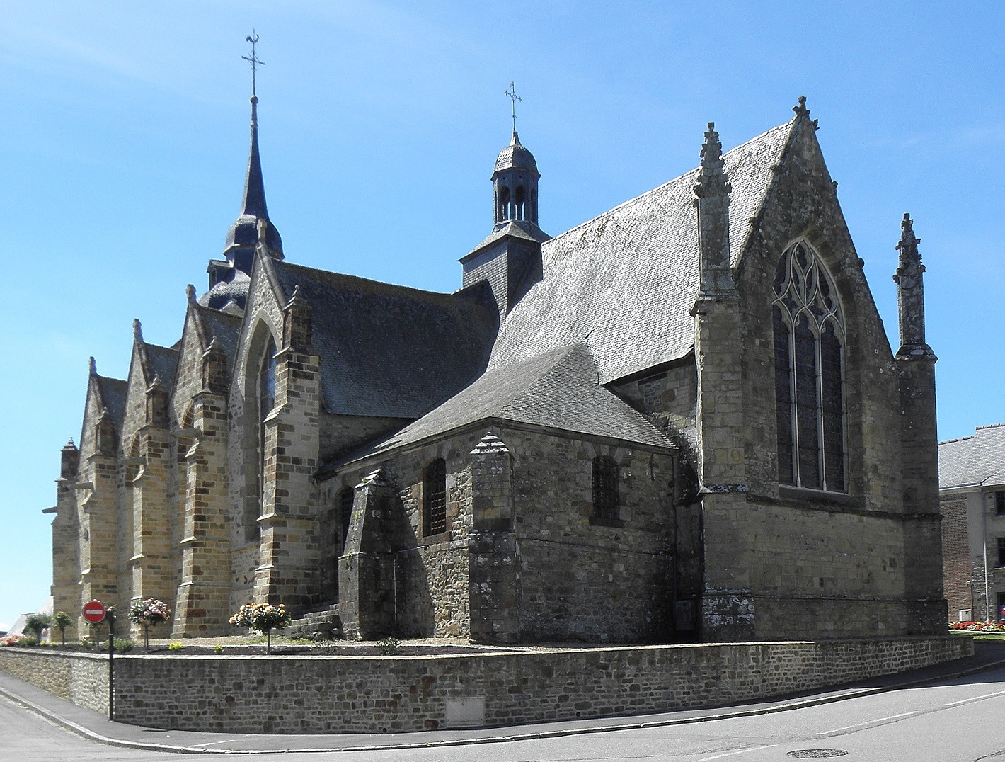 Extérieur de l'église Saint-Patern de Louvigné-de-Bais (35). Chevet et flanc sud.